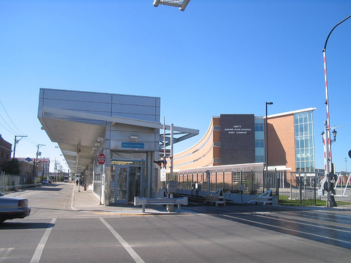 Station 54/Cermak